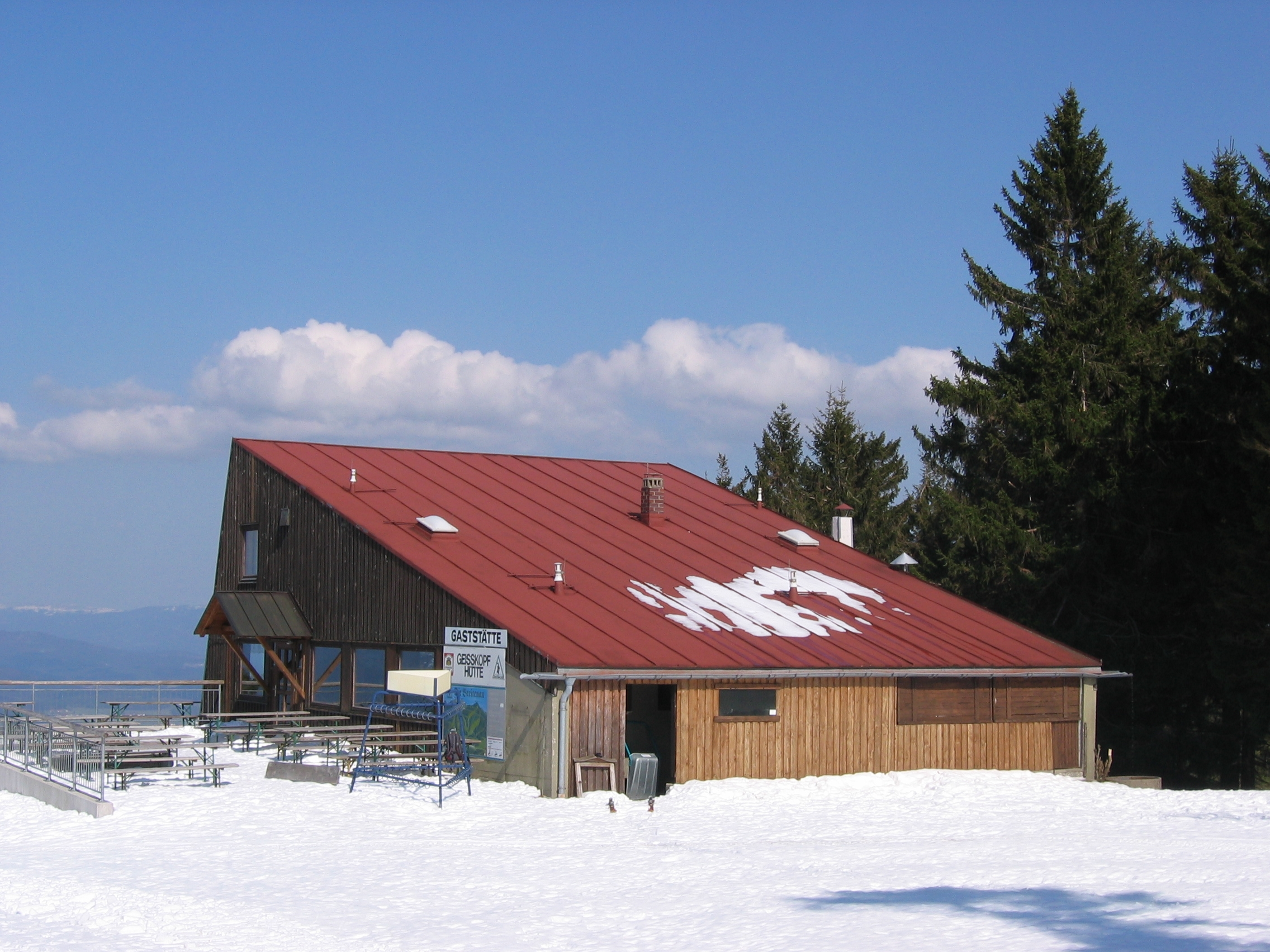 Geißkopfhütte